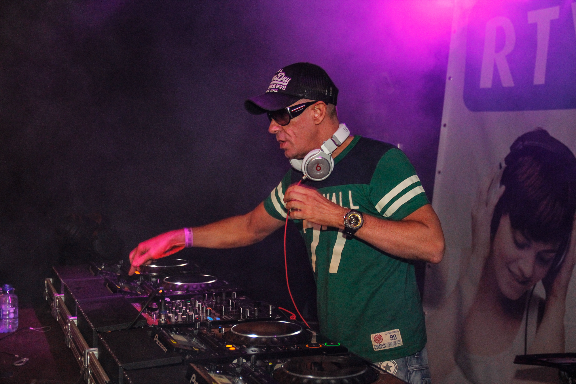 Dj Jean tijdens C'est la vie 2013 te Emmen